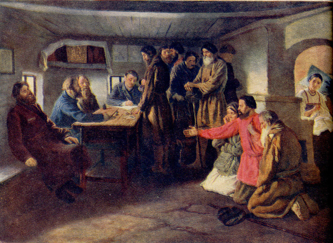 Константин Александрович Трутовский. Сбор недоимок на селе. 1886. Государственный музей изобразительных искусств Республики Татарстан